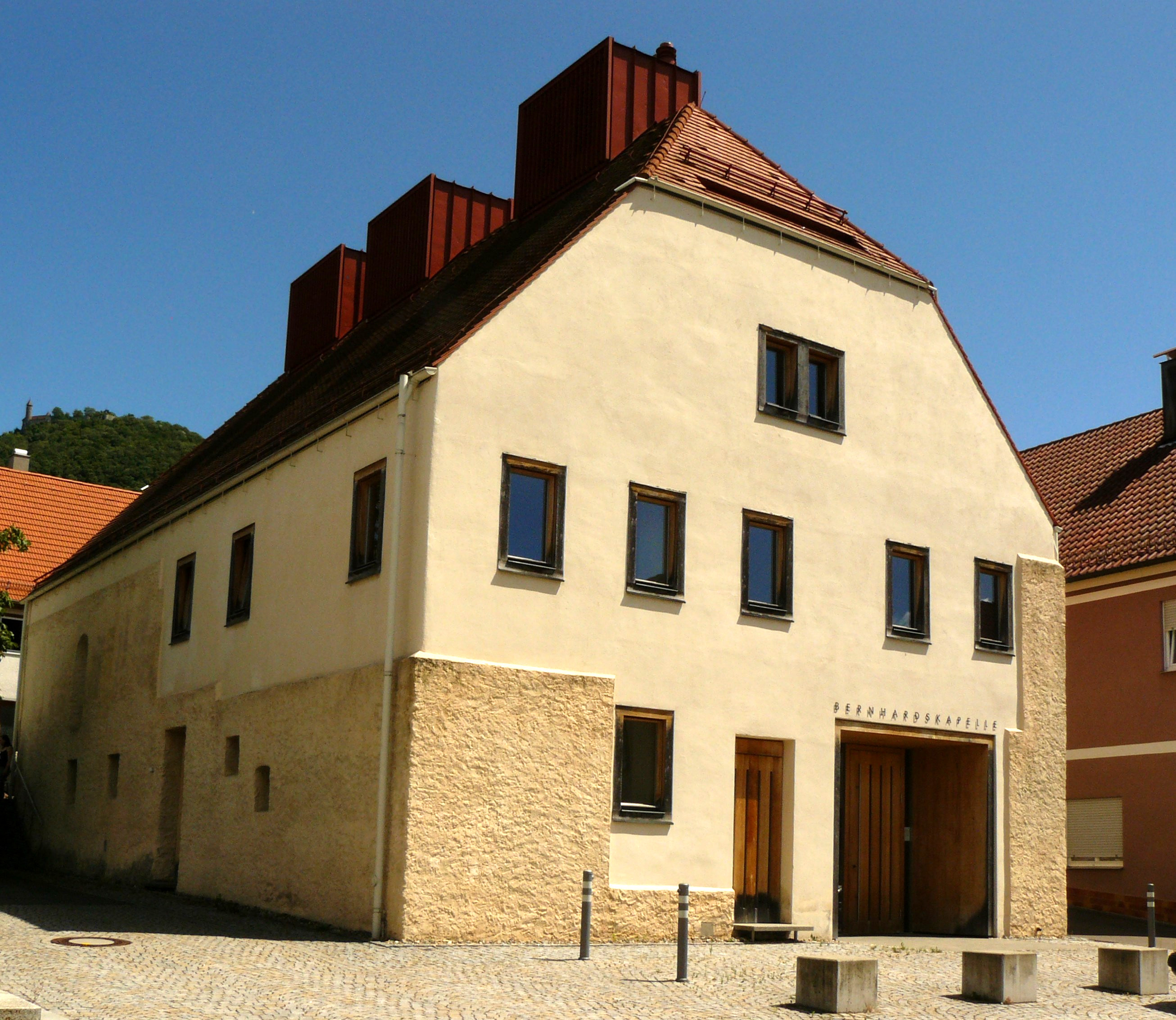 Die 2002 renovierte Berhardskapelle aus Owen